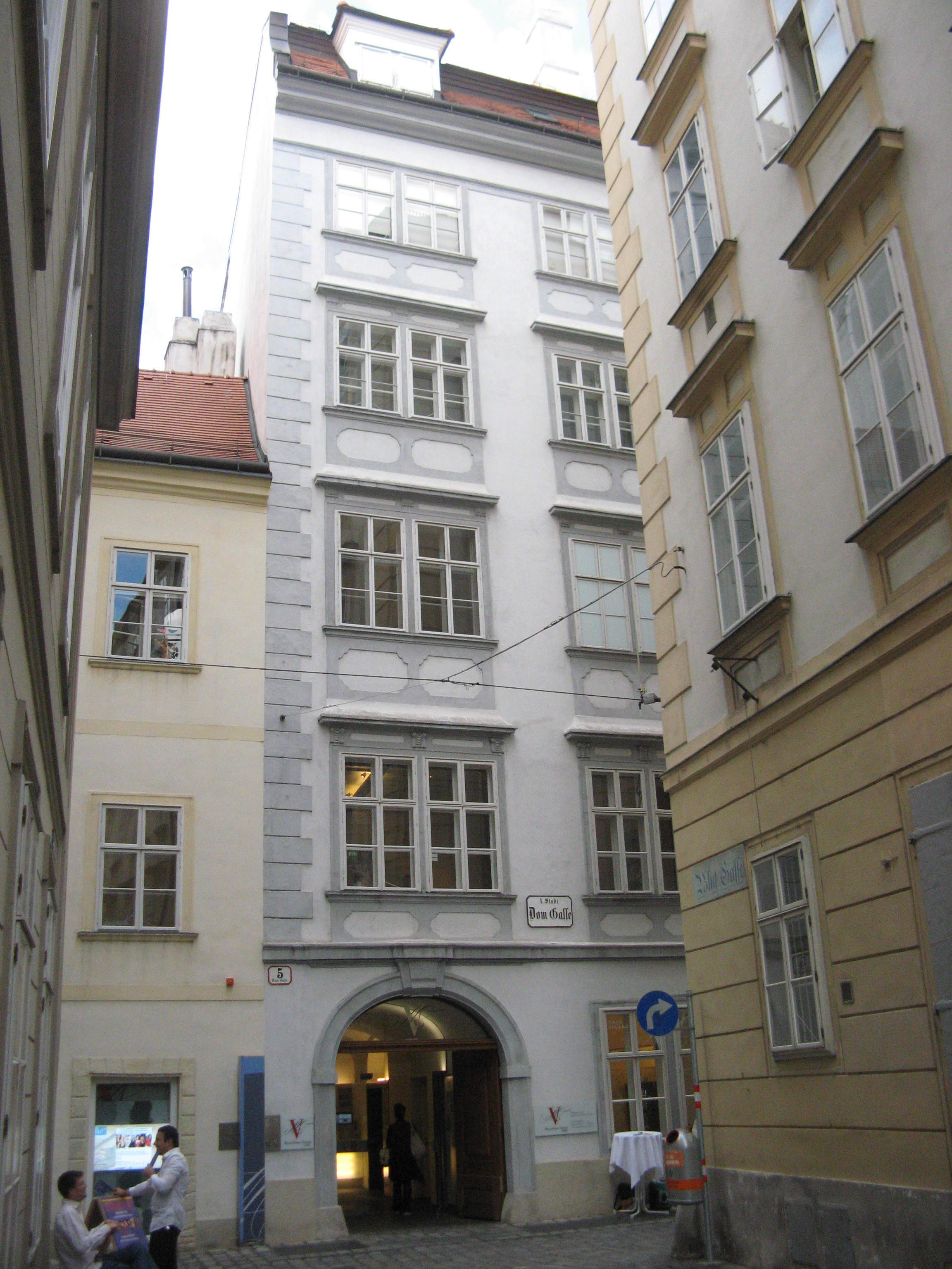 Mozarthaus (1716) von Andrea Simone Carove, Domgasse 5, Wien-Innere Stadt